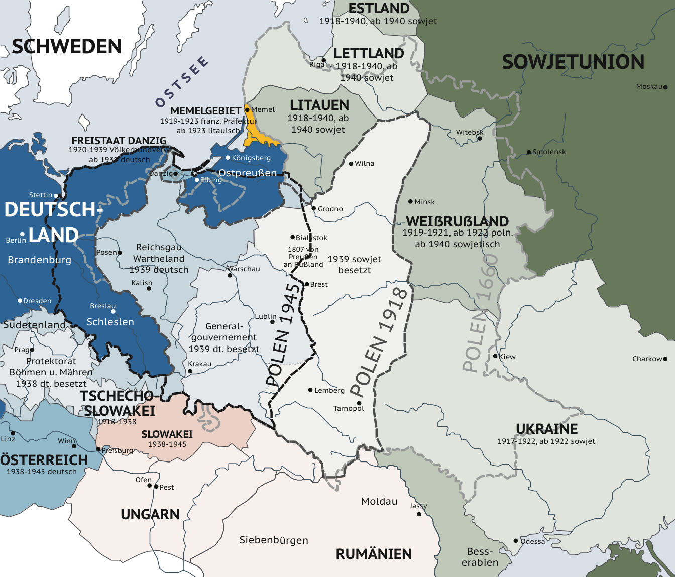 Darstellung zeigt Polen nach dem Versailler Vertrag, vierte polnischen Teilung 1939. Zeichnung erstellt 2004 von Benutzer:Sansculotte. Bild ist unter der Creative Commons Share Alike zur weiteren Verwendung freigegeben. Quellenangabe und Beleg an erbeten.